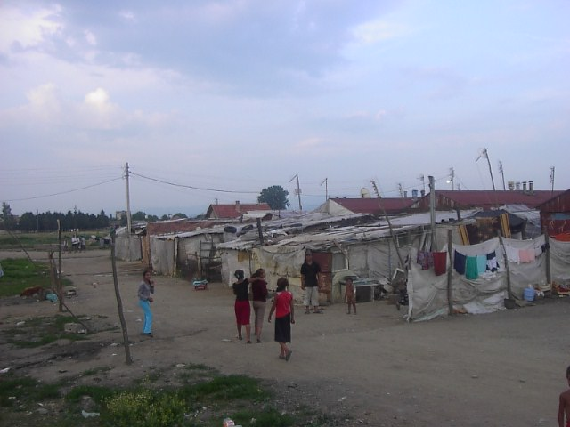 Blick auf Zigeuner-Camp in Serbien. Zigeuner-Unterbringungslager in Serbien, Nähe Kosovo Die Menschen dort sind einige Jahre zuvor wegen des Krieges aus dem Kosovo geflohen.